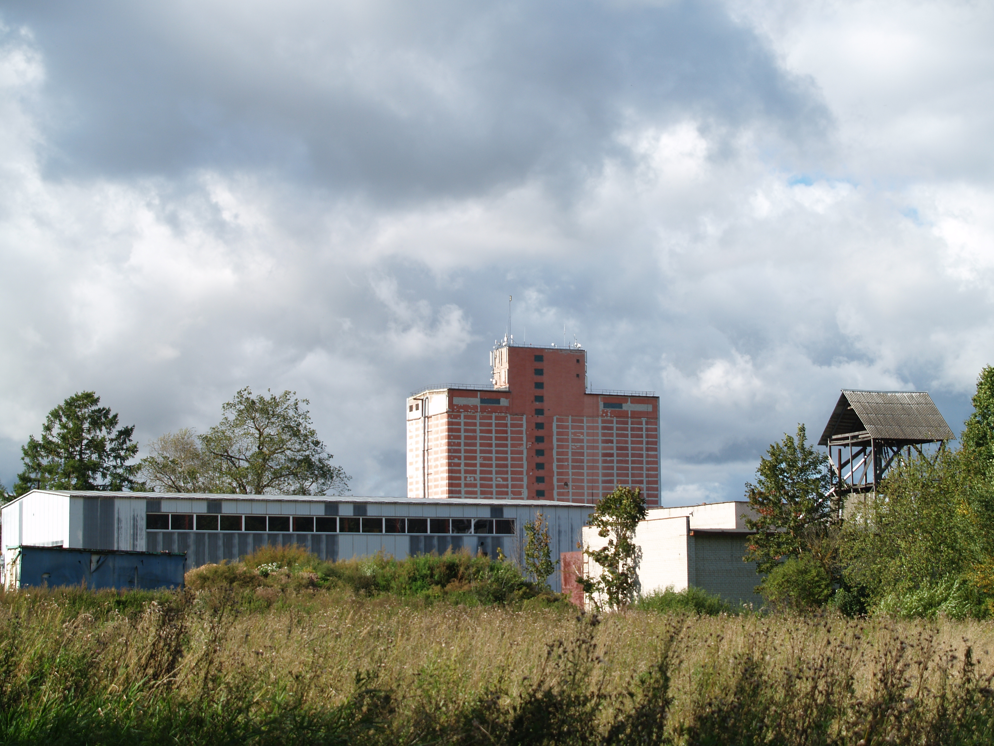 Reola vaade